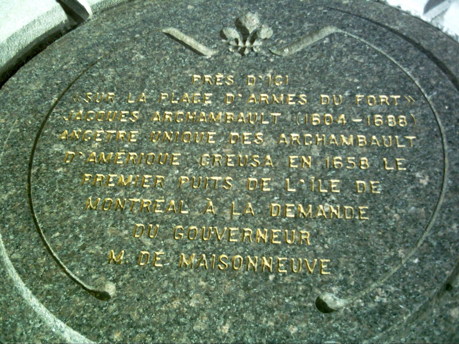 Plaque sur l'emplacement du premier puits creusé sur l'île de Montréal par Jacques Archambault. Située à la Pointe-à-Callière dans le Vieux-Montréal.